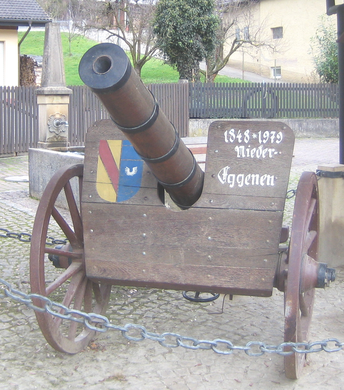 hölzerne Kanone in Niedereggenen